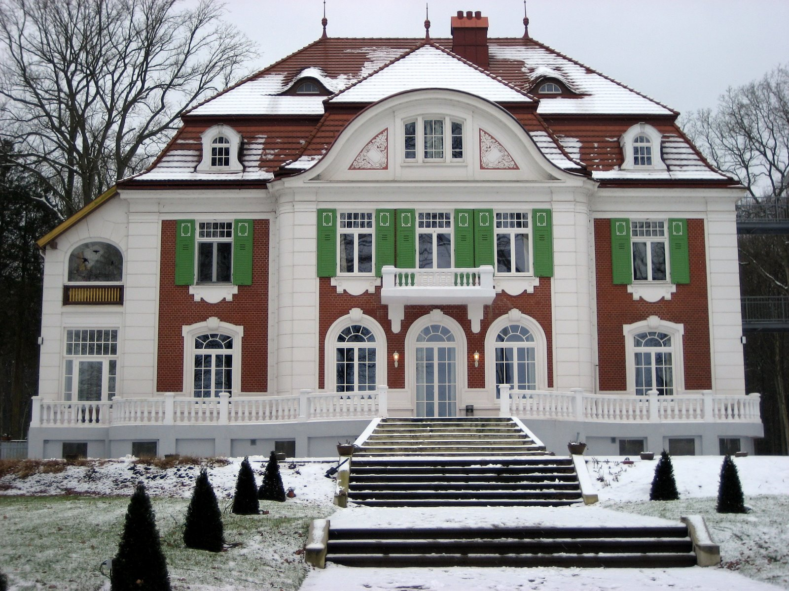 Haus Schnede